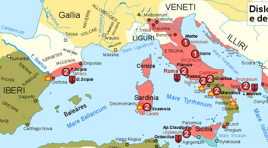 Dislocazione e dimensione delle armate romane nel 215 a.C. durante la seconda guerra punica